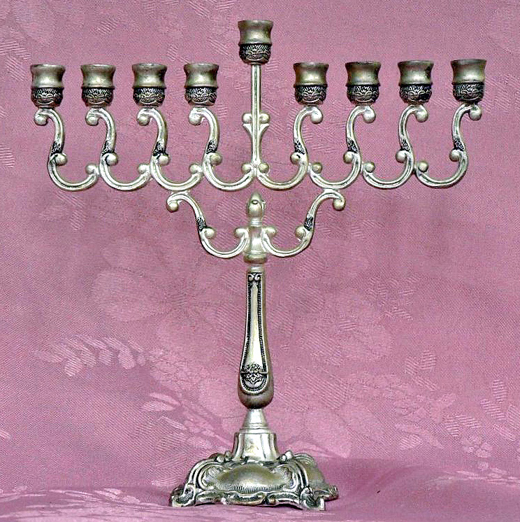 Hanukia, Chanukkiyah חנוכיה Author: MathKnight